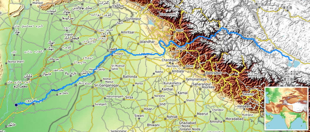 carte réalisée sur umap.openstreetmap , This map may be incomplete, and may contain errors. Don't rely solely on it for navigation.